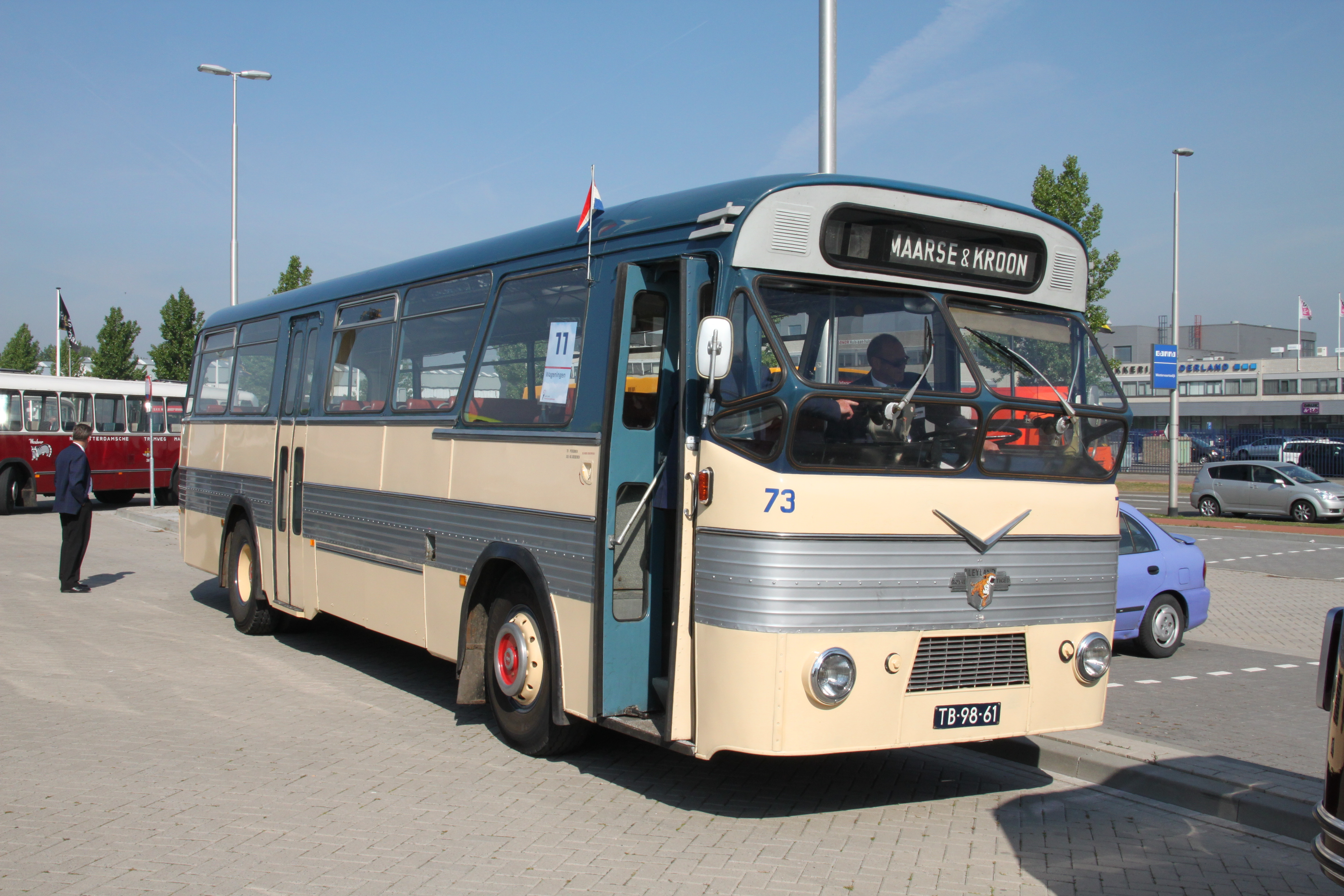 Maarse en Kroon 73 in Arnhem 2011.